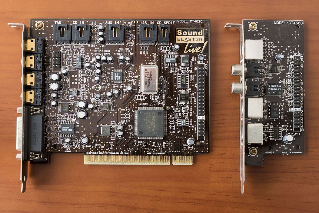 Sound Blaster Live! junto a la tarjeta de E/S digital SP/DIF y E/S MIDI